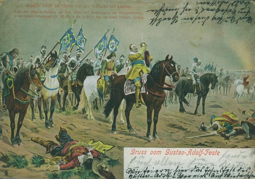 Gebet vor der Schlacht von Lützen